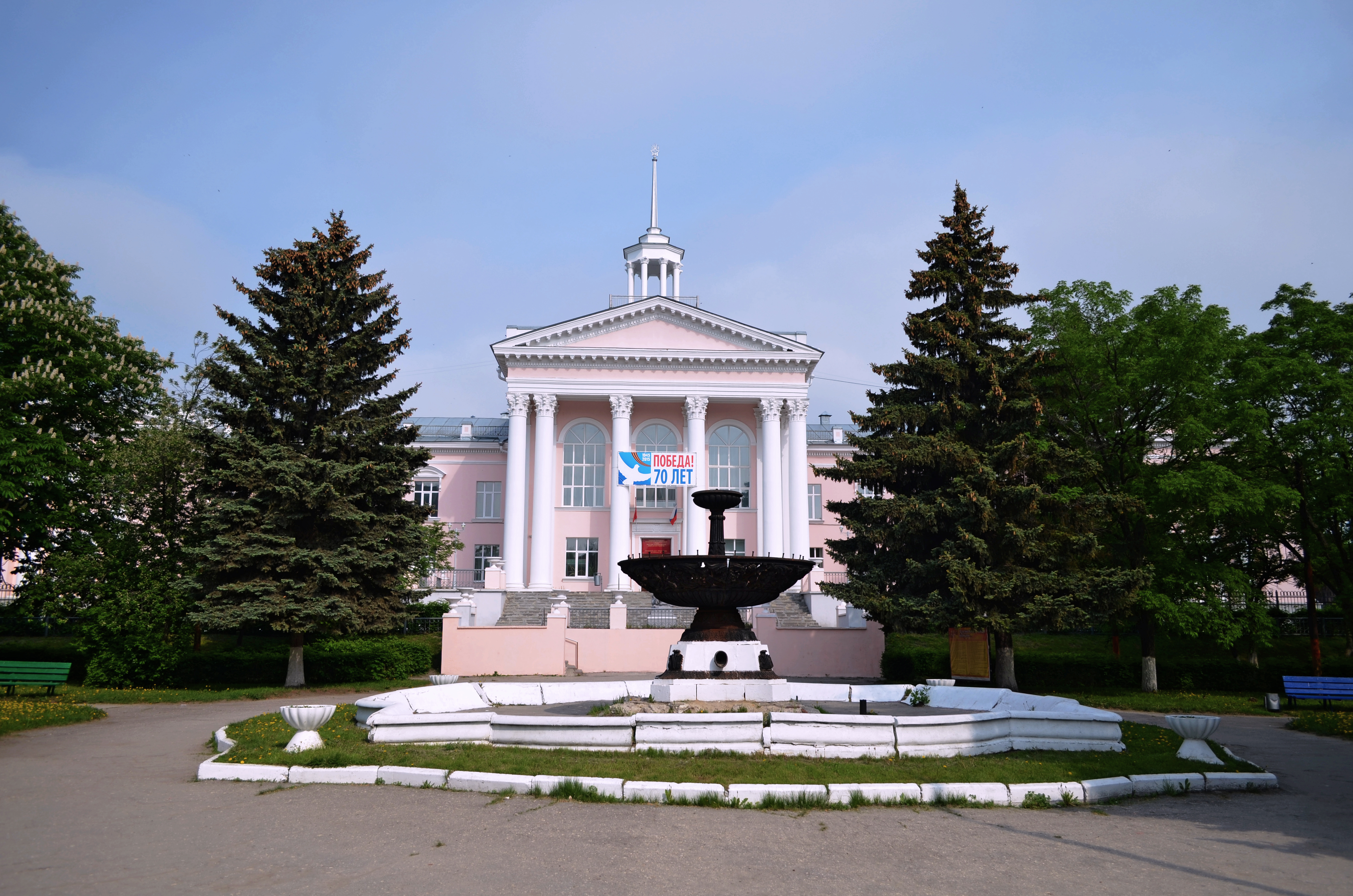 Дворец пионеров: улица С.Есенина, 46, Рязань, Рязанская область